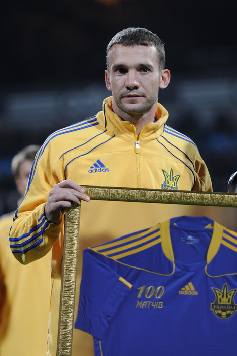 Андрій Шевченко перед 100-м матчем за збірну України